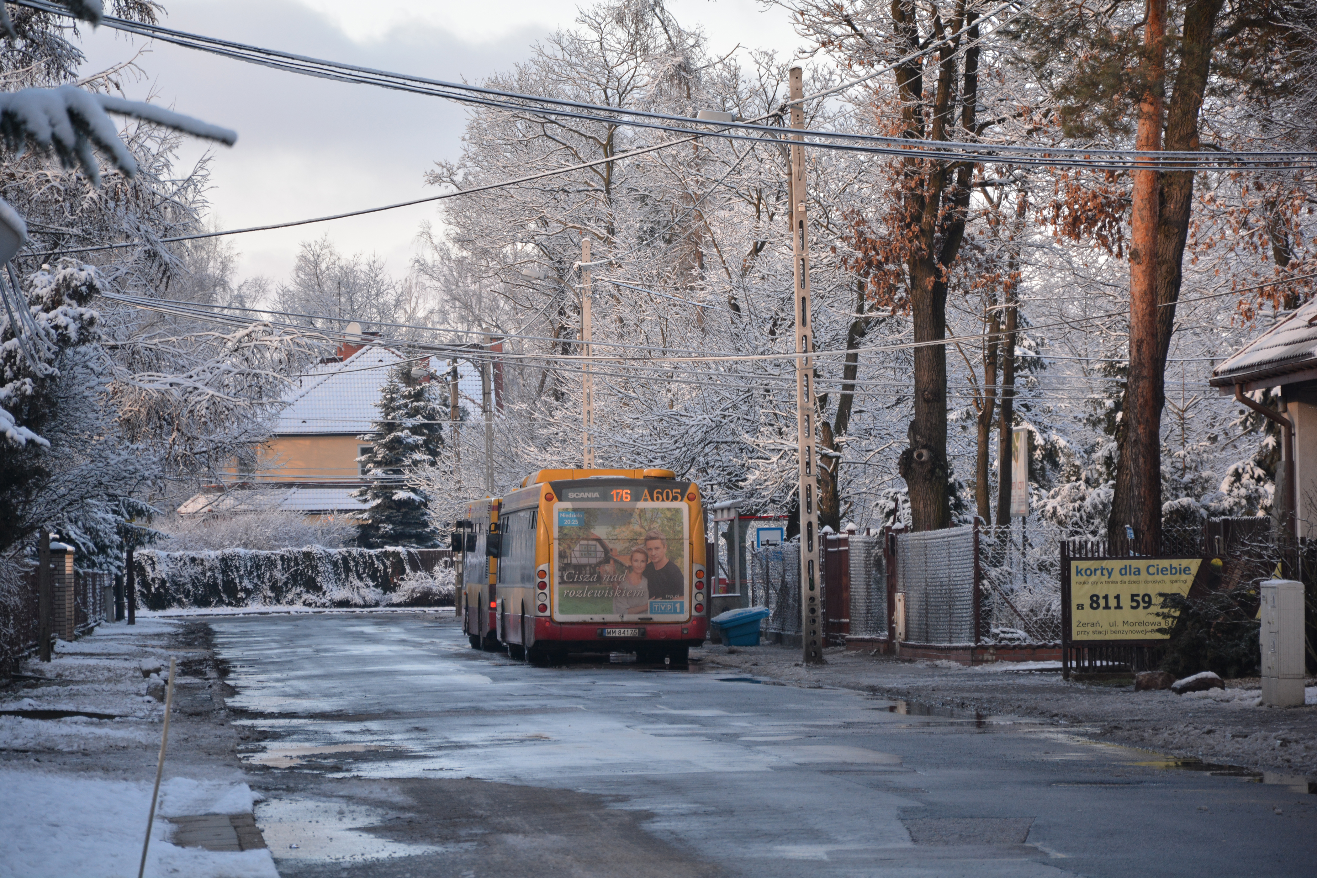 Pętla autobusowan na ulicy Raciborskiej na warszawskiej Choszczówce